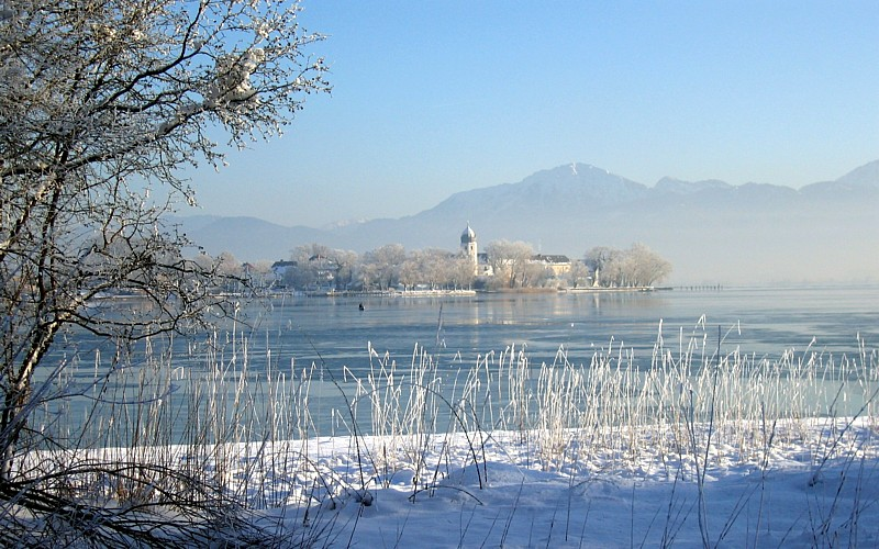 Chiemsee - Bayern - Deutschland